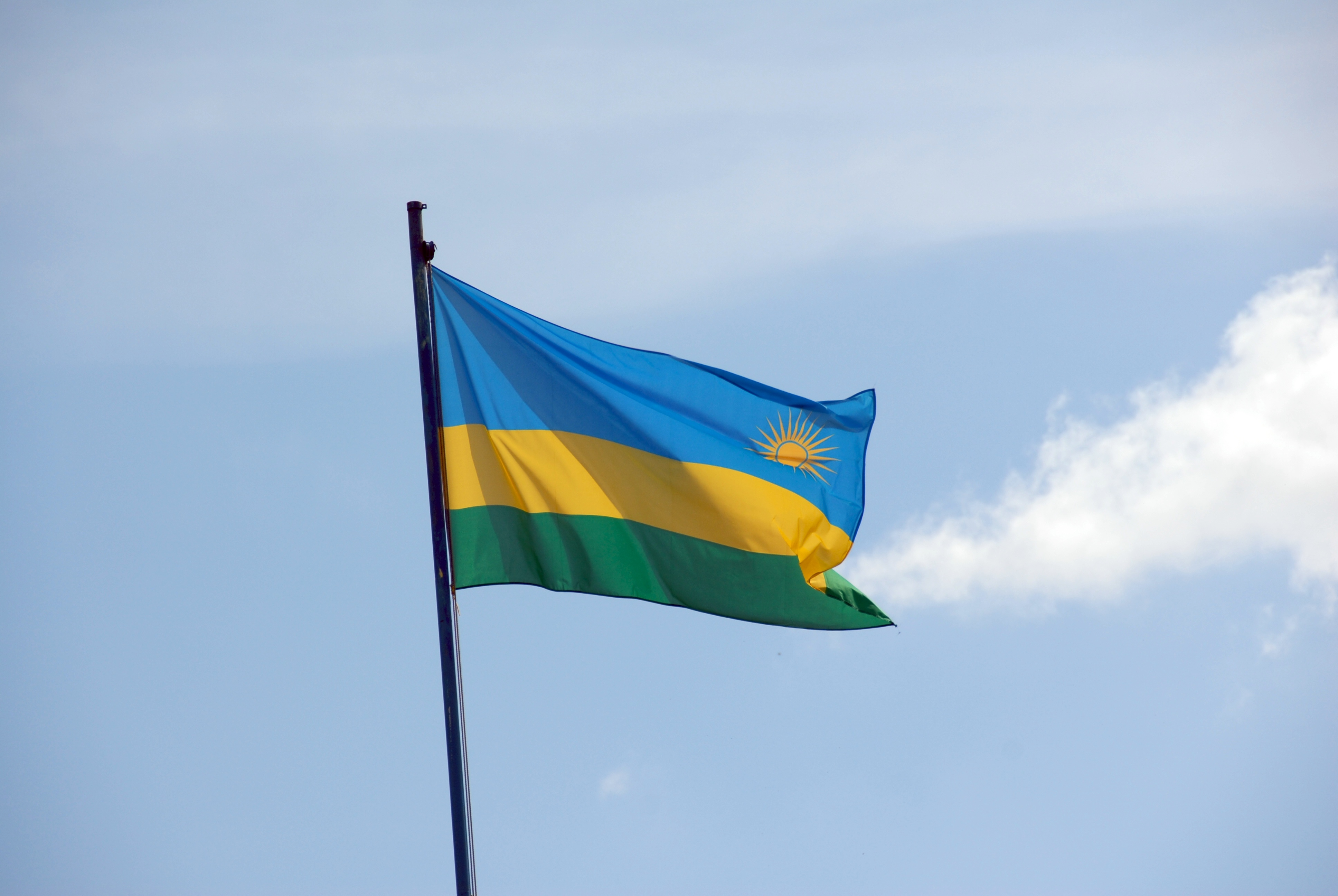 africa0703-0394a